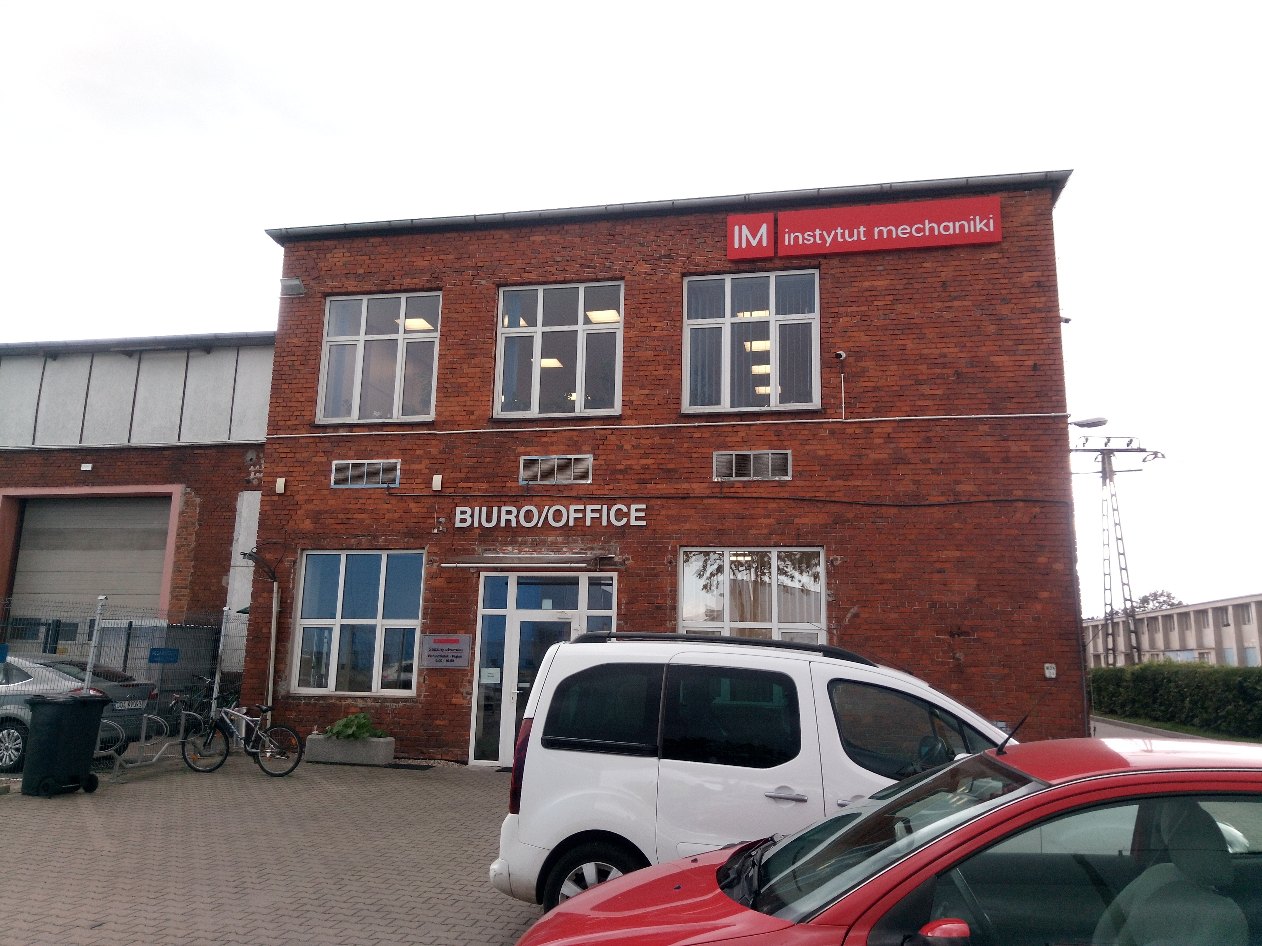 Інстытут механікі